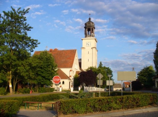 Kościół w Osiu